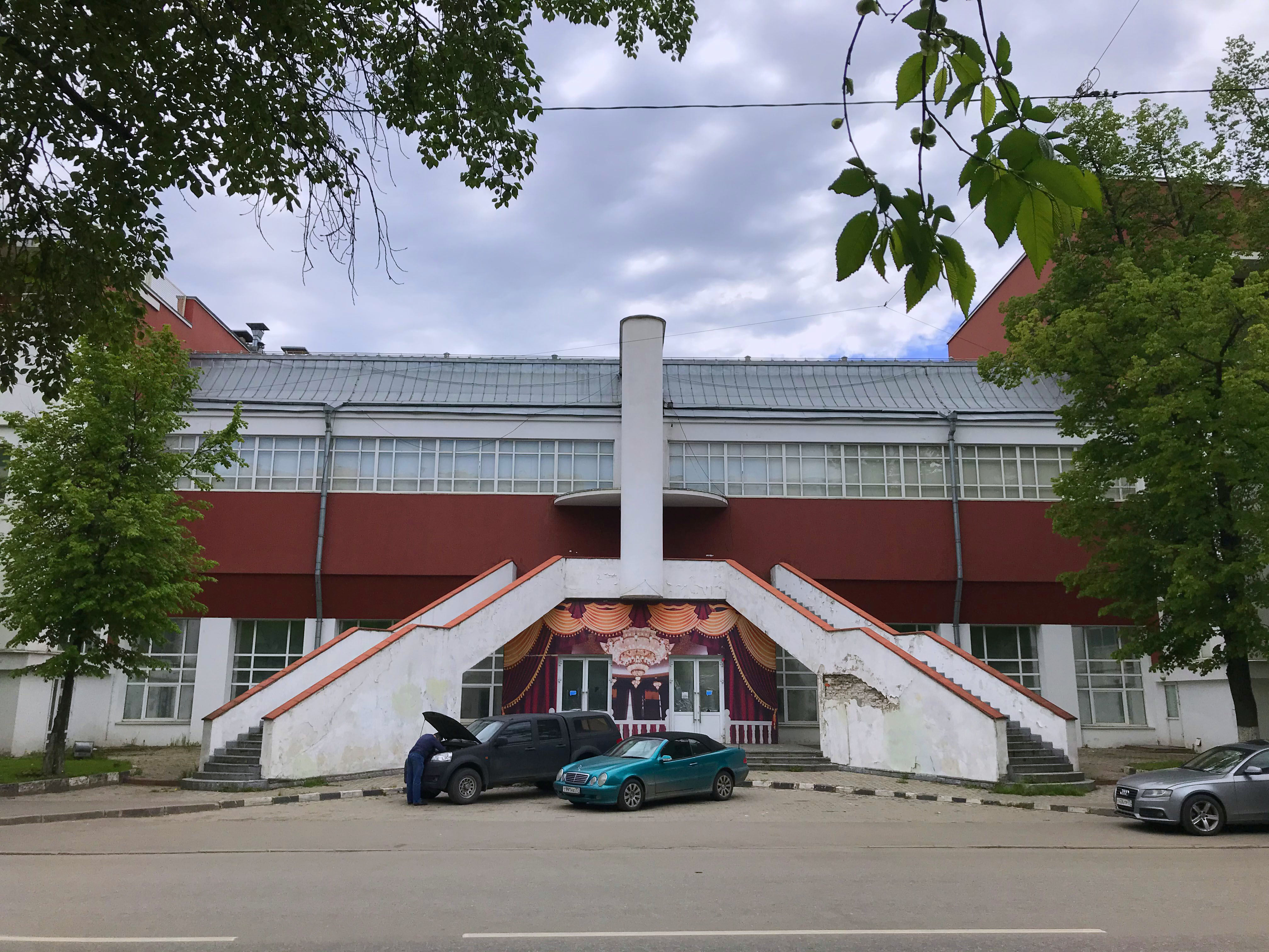 Входная группа здания клуба